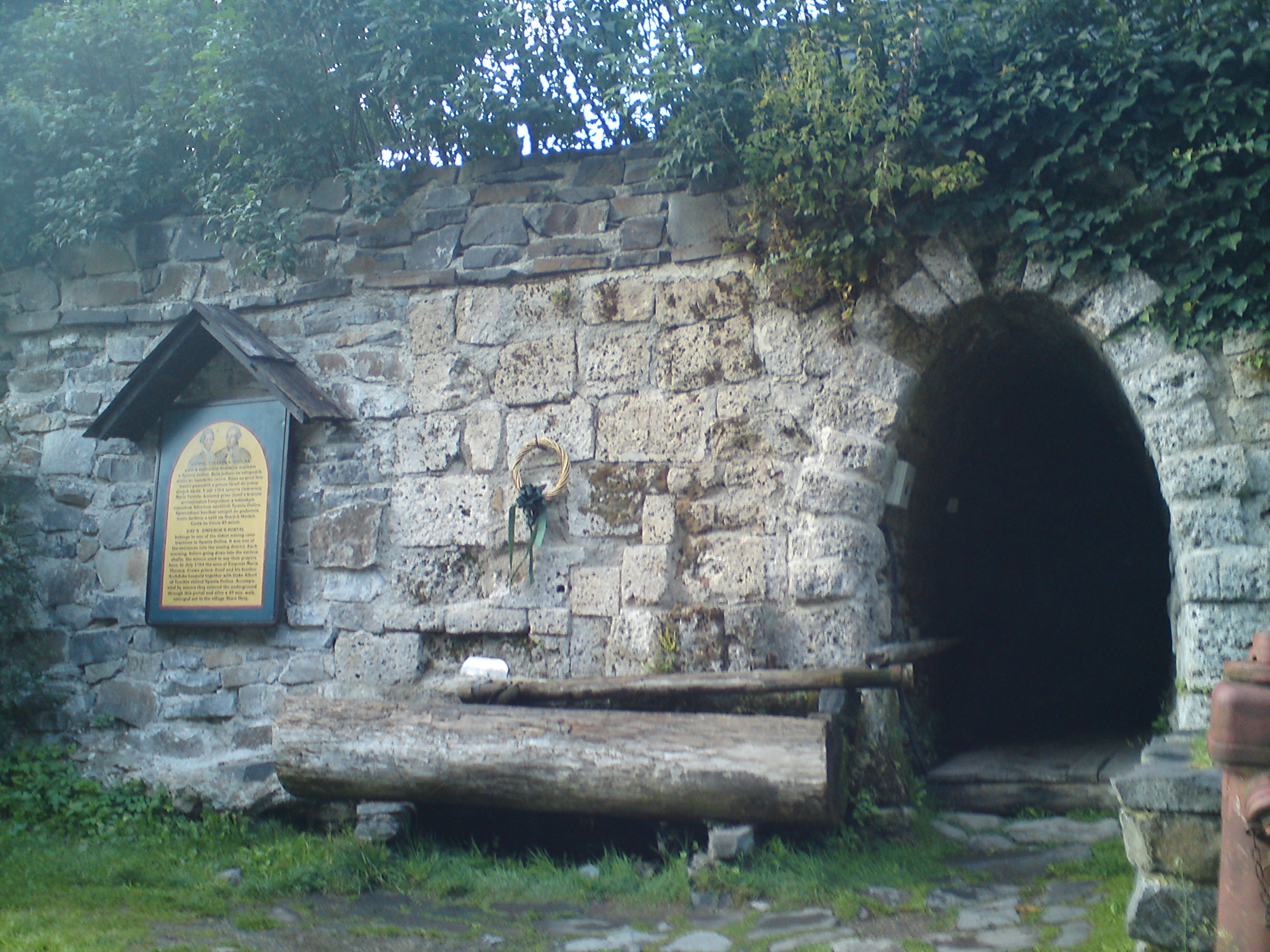 Ferdinandova sachta pri klopacke